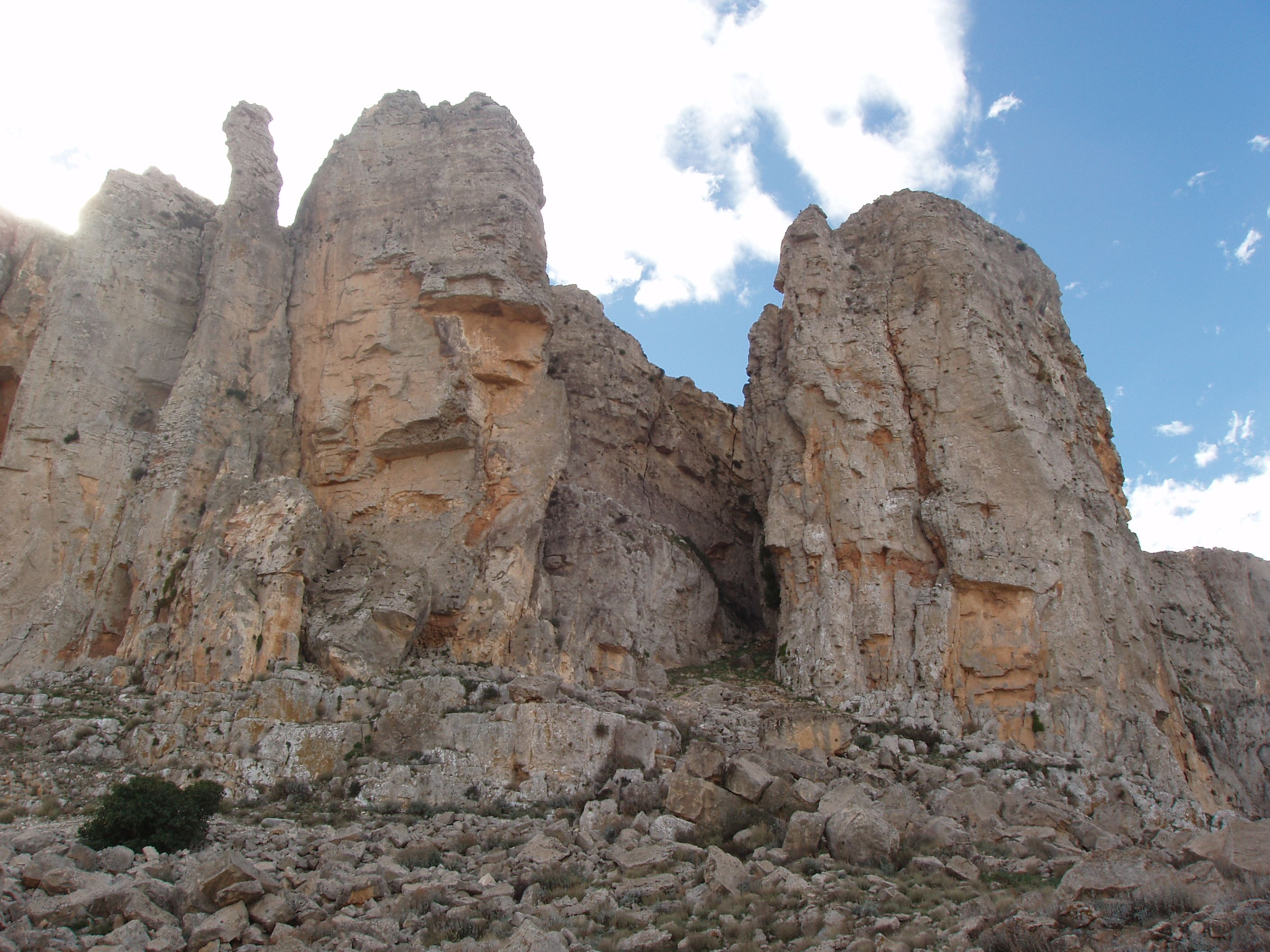 Emplacement de la faille du Ligure de la Table de Jugurtha, près de Kalaat Senan, telle que racontée par Salluste dans les guerres de Jugurtha